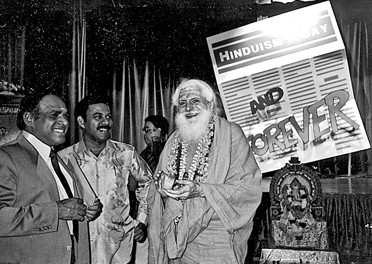 Satguru Sivaya Subramuniyaswami (Gurudeva) in Malaysia, 1991, celebrating his magazine Hinduism Today